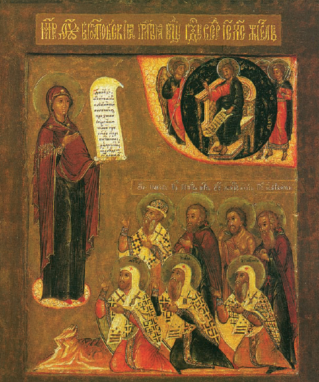 A Stroganov School icon of the Theotokos with the saints of Rostov "Богоматерь Моление о народе, с ростовскими святыми" (на первом плане - ростовские епископы Леонтий, Исайя и Игнатий; на втором - епископ Иаков, Пётр Ордынский царевич, Исидор Блаженный, преподобный Авраамий)